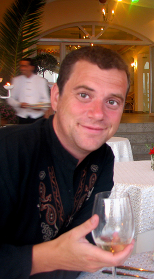 franck benoist